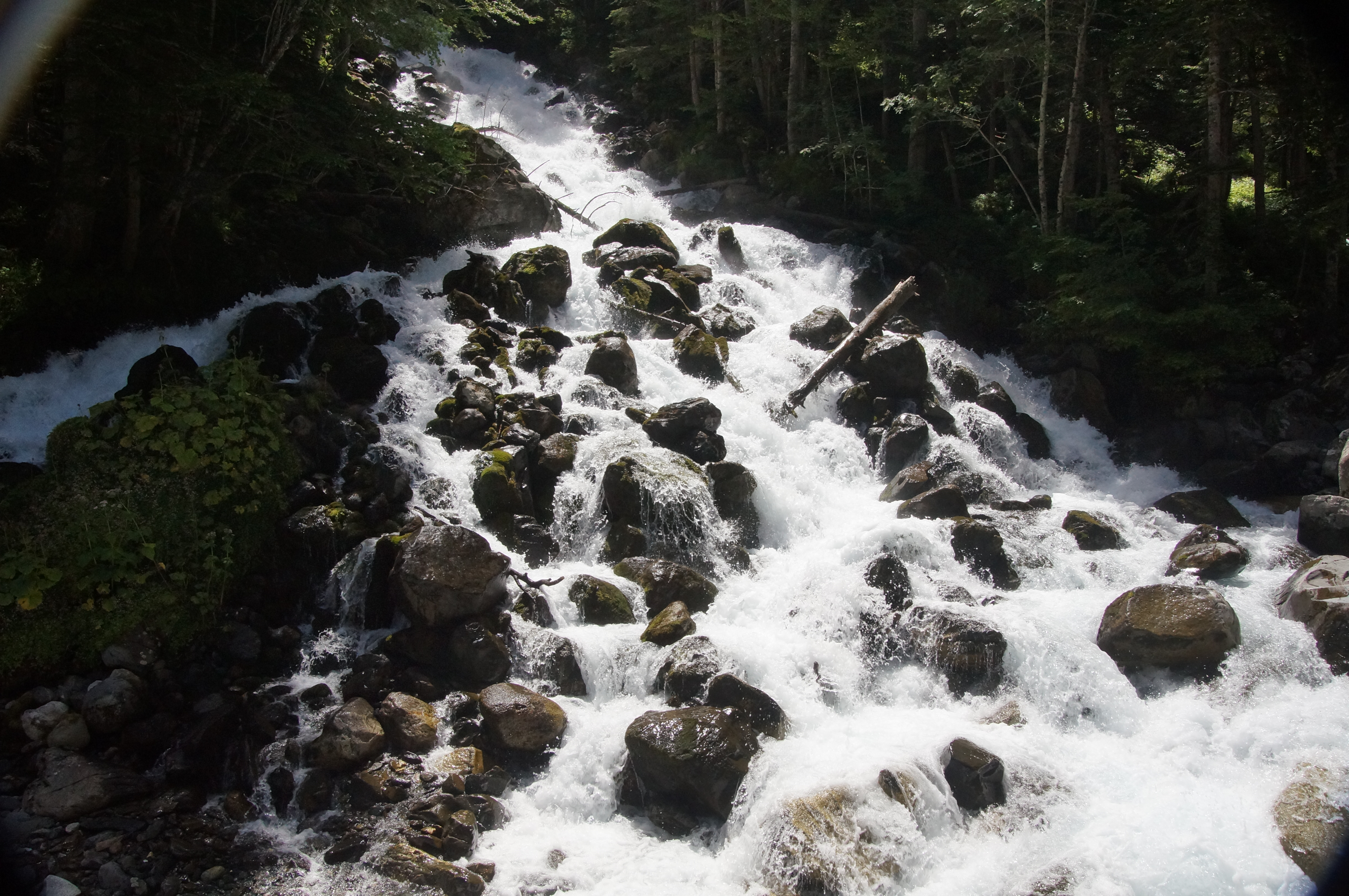 Geozona Uelhs deth Joèu - Còth deth Tòro (Vielha e Mijaran) This is a a photo of a geologic site or geotope in Catalonia, Spain, with id: IEIGC-103